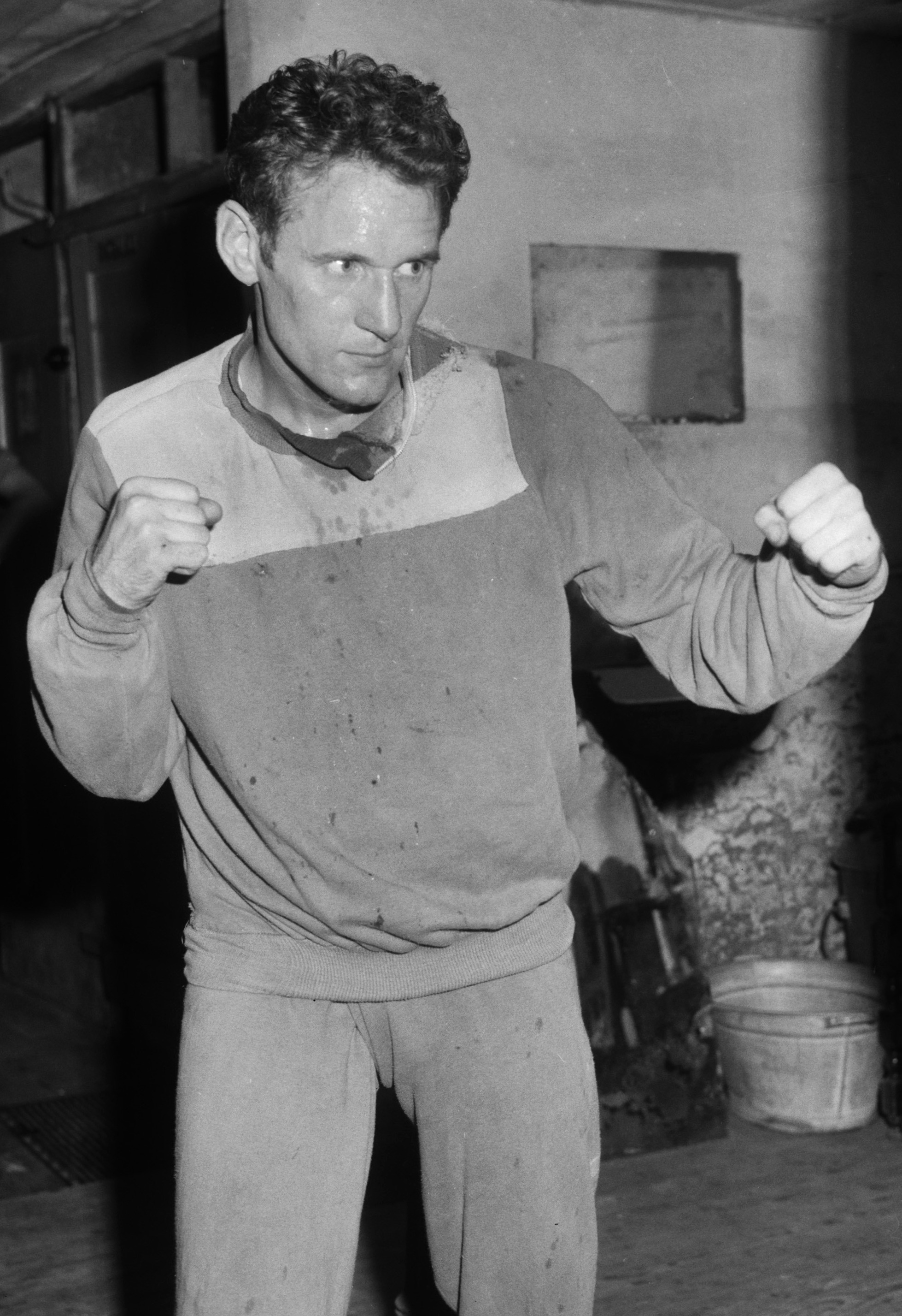 Boksers voor Olympische Spelen 1964 Jan de Rooy (vedergewicht)